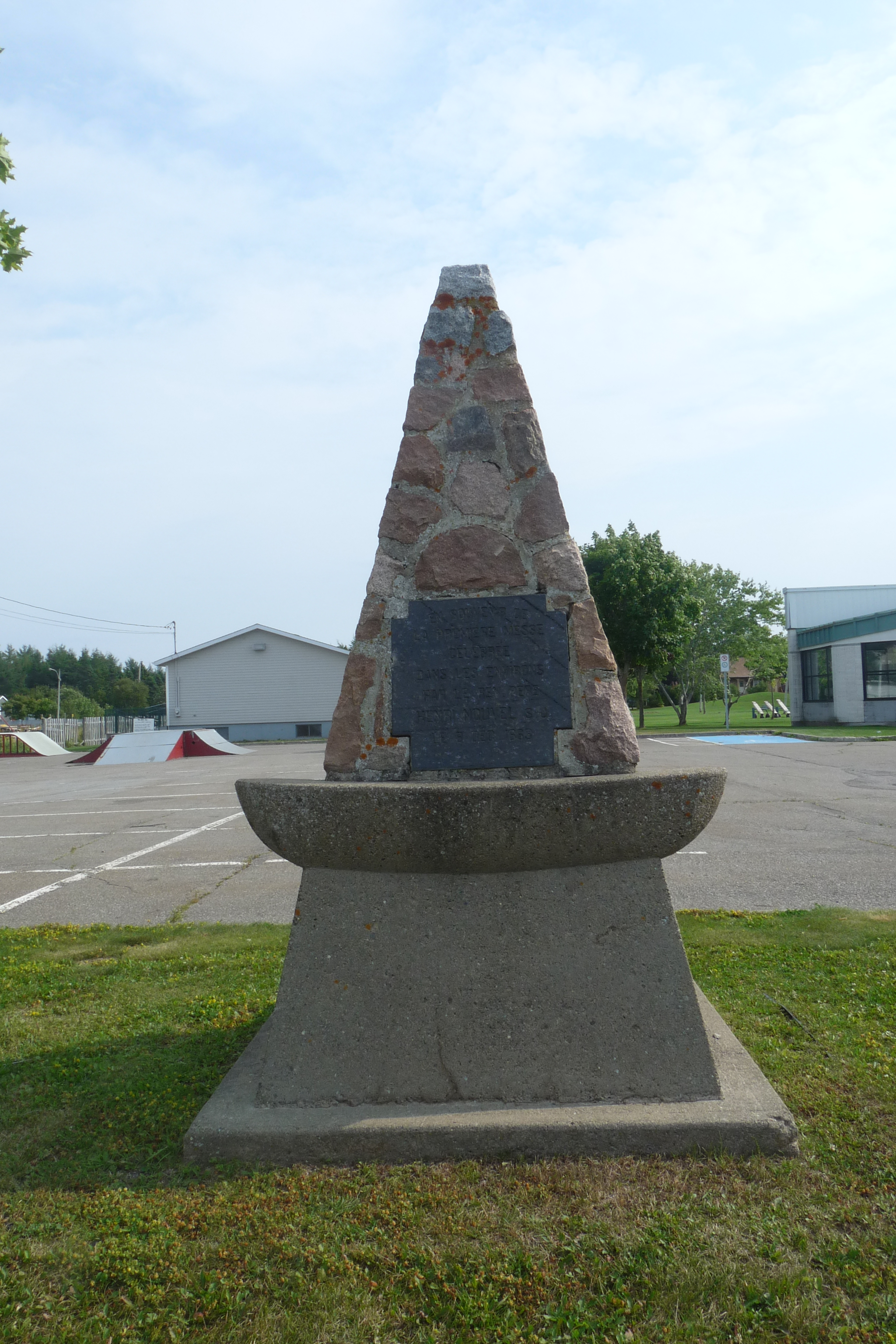 Monument du tricentenaire de la messe célébrée par Henri Nouvel à Pointe-au-Père en 1663.